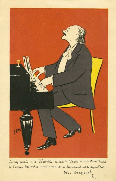 Jules Massenet caricaturé par Sem. Autographe de Sem : « Je suis certain que les bénédictins au temps du Jongleur de Notre-Dame buvaient de l'exquise bénédictine comme nous en avons heureusement encore aujourd'hui, M. Massenet. »